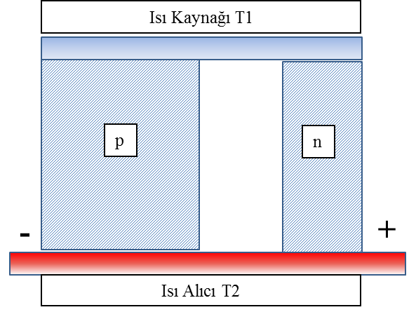 P-N bağlantılı peltier soğutucu